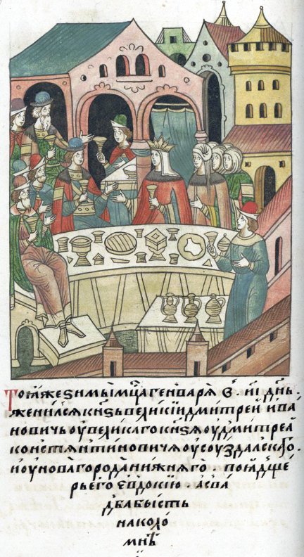 ЛИЦЕВОЙ ЛЕТОПИСНЫЙ СВОД В ту же зиму месяца января в 18 день женился великий князь Дмитрий Иванович, взяв в жены Евдокию, дочь великого князя Дмитрия Константиновича Суздальского и Нижнего Новгорода, а свадьба была в Коломне.